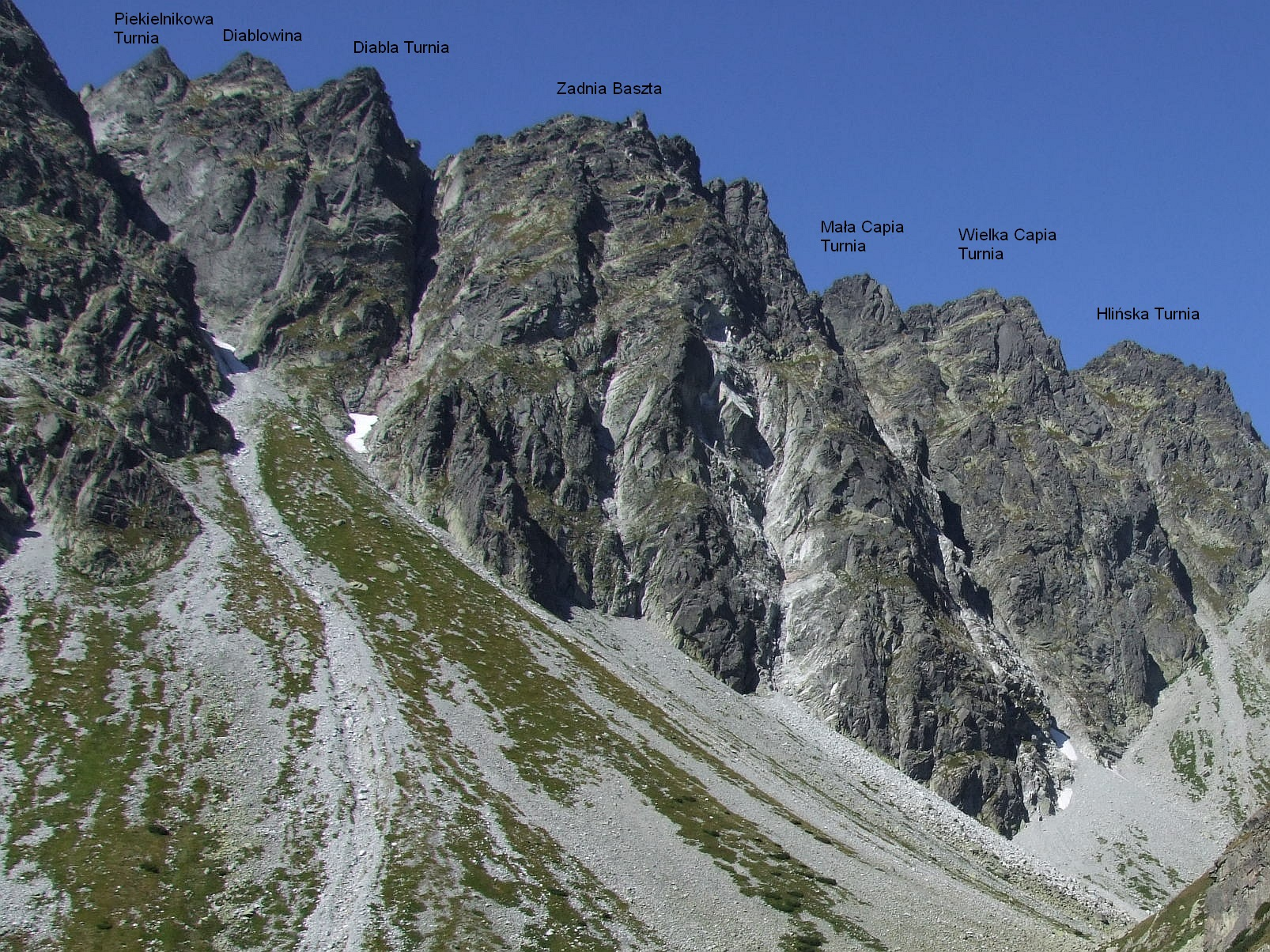 Grań Baszt (Tatry Wysokie)